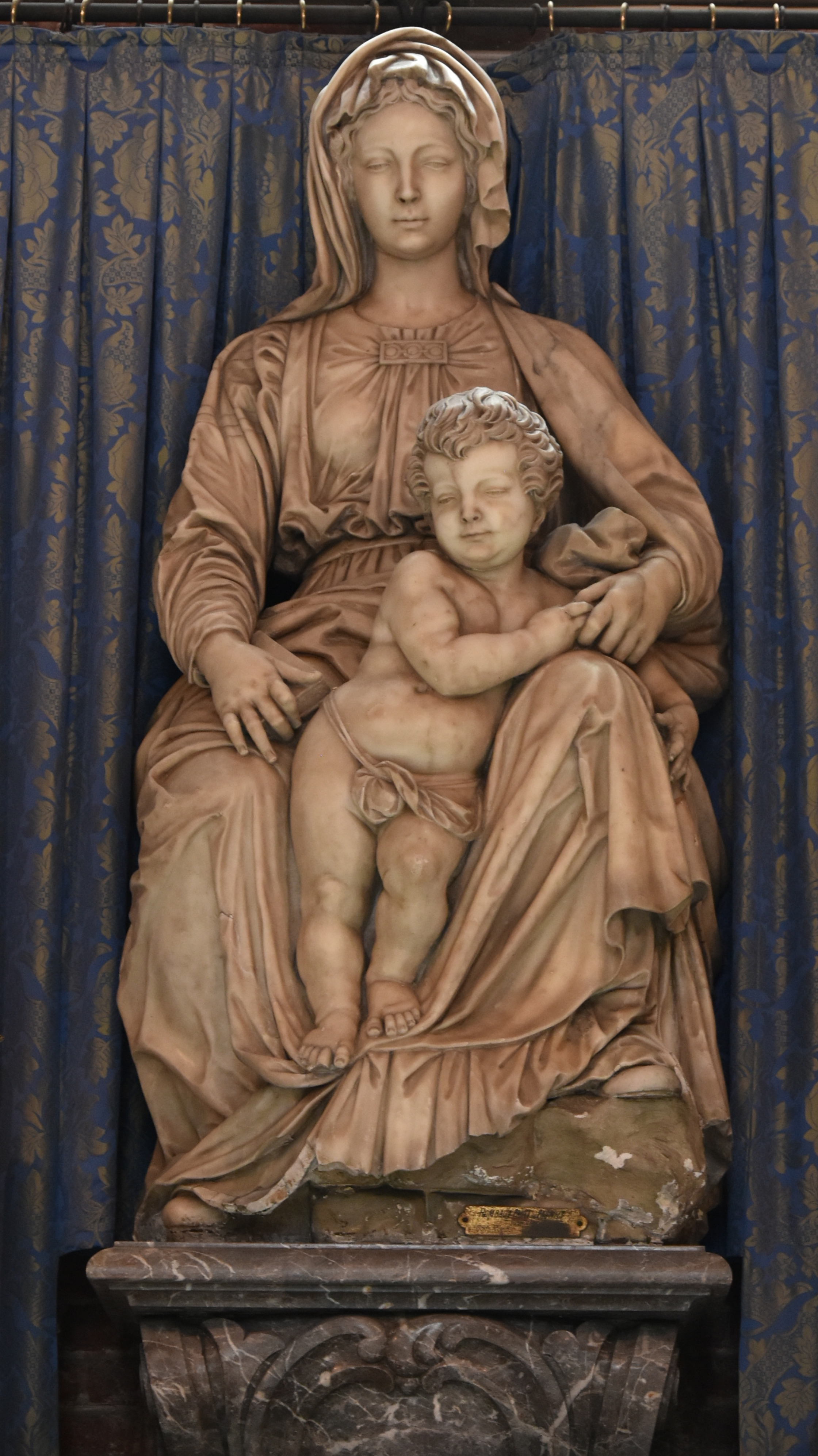 Rombout Pauwels (ca.1625-1692) Madonna met het Kind Sint-Michielskerk Gent 30-06-2019 14-14-28 This photo of movable heritage has been taken in the Flemish Region